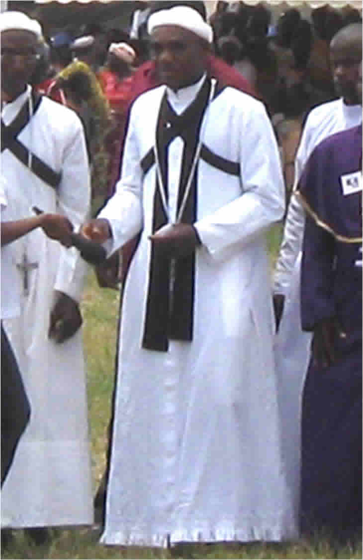 Prédicateur harriste lors d'une manifestation publique à Krézoukoué (département de Divo) en Côte d'Ivoire